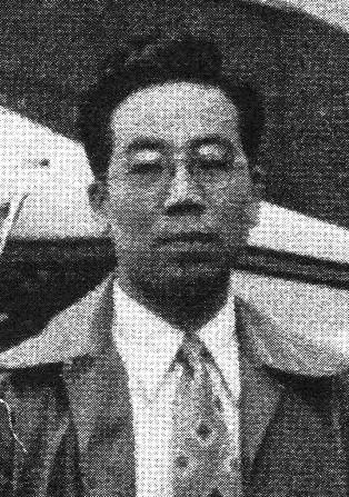 桜井眞一郎、たま自動車／プリンス自動車工業入社翌年の撮影。